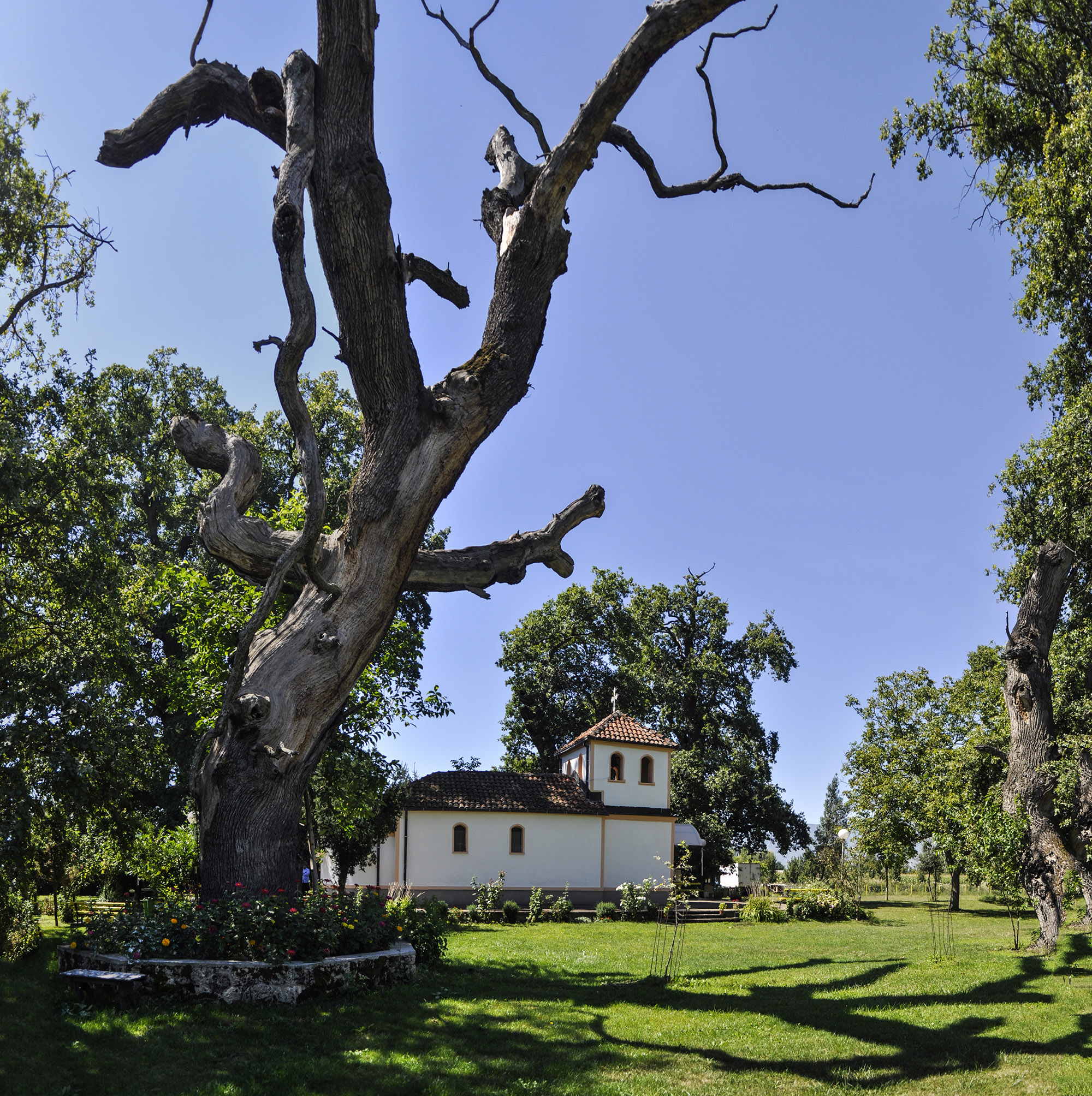 Манастир Свети Спас во Мороишта се наоѓа до реката Сатеска, сместен помеѓу столетните дрвја